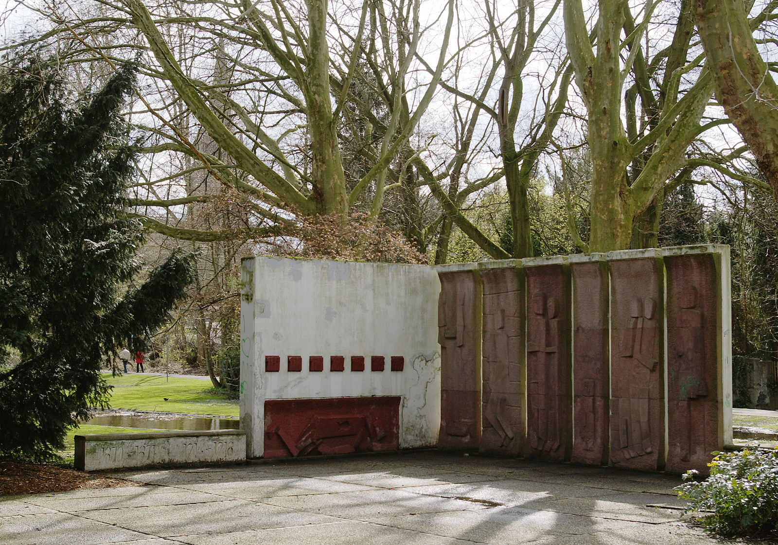 Mahnmal gegen den Krieg. Von Josef Baron, Unna. Standort: bis 2008 im Emscherpark Holzwickede.